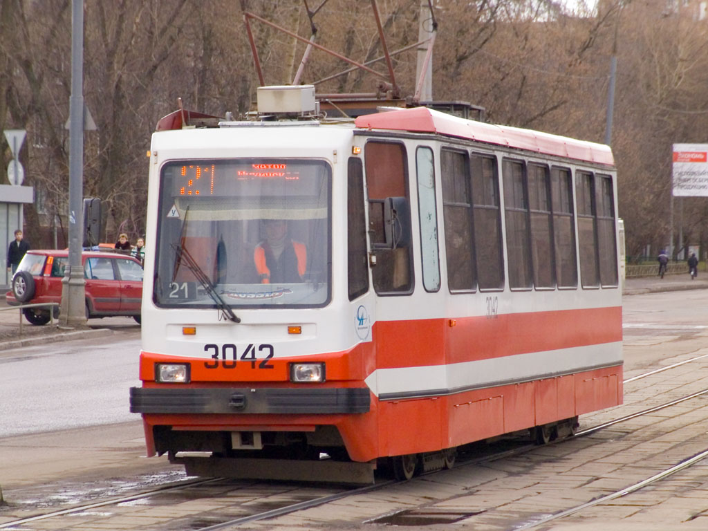 Трамвай модели ЛМ-99А на улицах Москвы